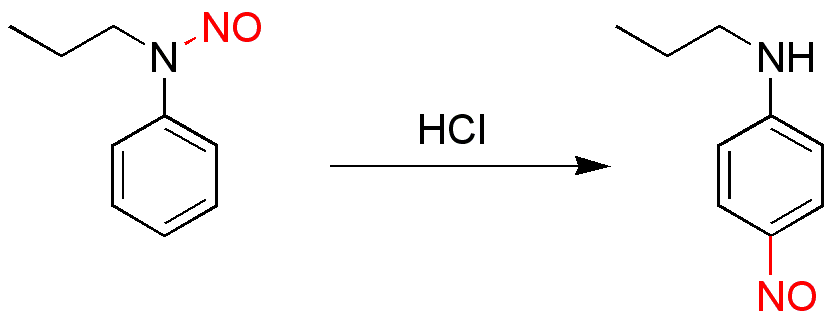 Fischer-Hepp-omlegging, algemeen rxn-schema (eigen creatie)